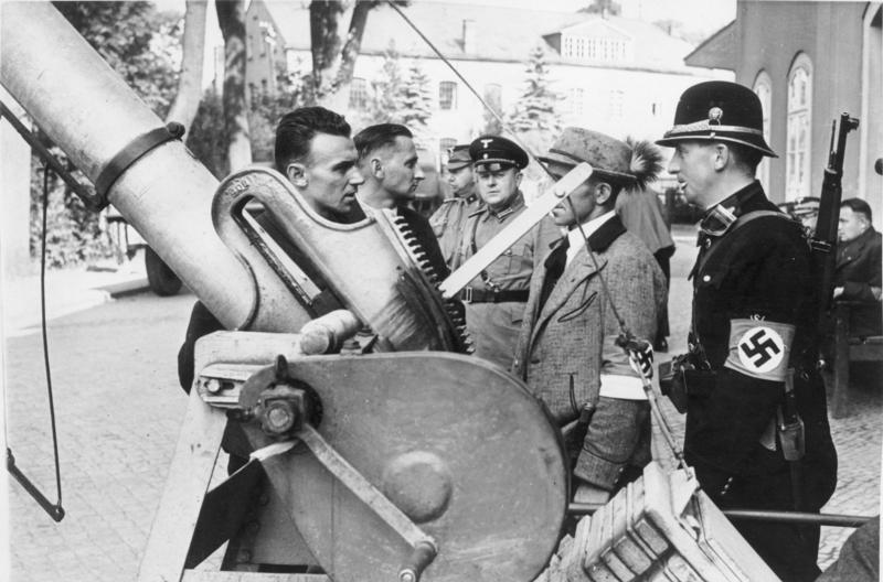 Dem tschechischen Terror entronnen. U.B.: Ein Sudetendeutscher Polizeibeamter, der in voller Uniform über die Grenze gekommen war, tut jetzt zusammen mit seinen deutschen Kameraden Dienst am deutschen Zollhaus bei Sebnitz. 23.9.1938 Rd.-Sche. D 2303. a.b.c.